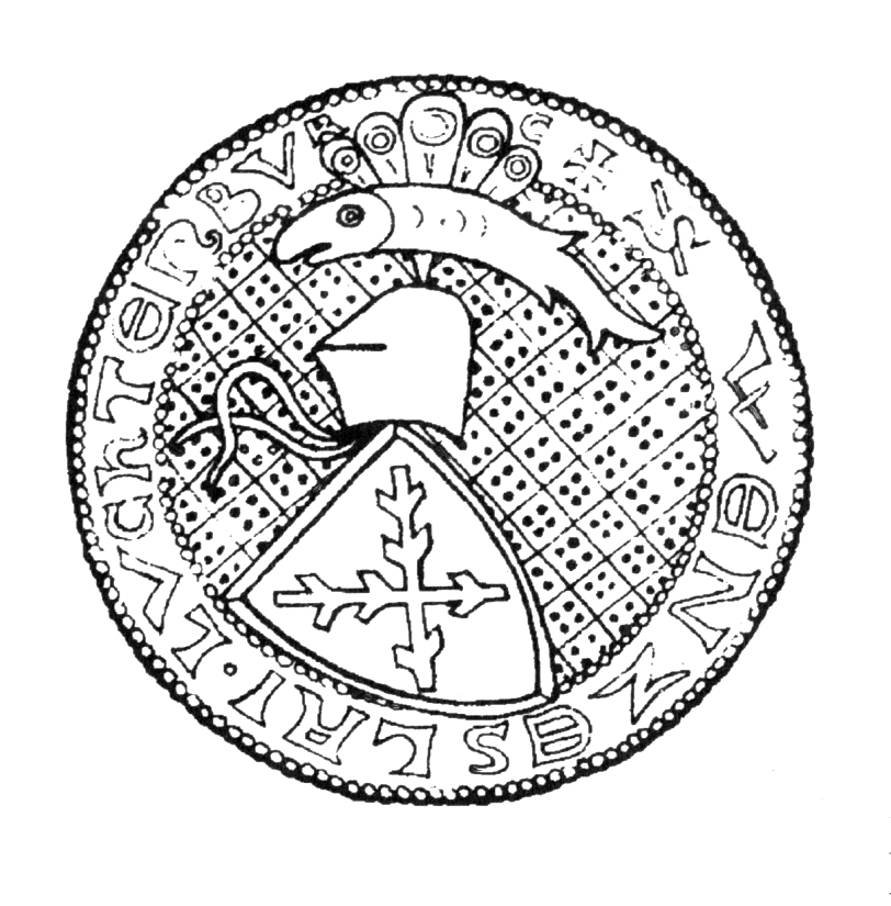 Kresba pečeti Václava Žlebského z Lichtenburka od Augusta Sedláčka, Hrady, zámky a tvrze - díl XII. Čáslavsko